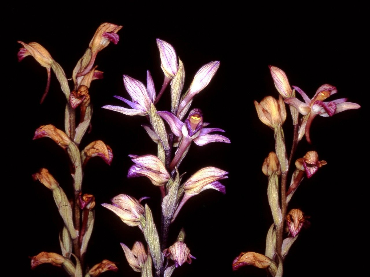 Limodorum abortivum - flowers